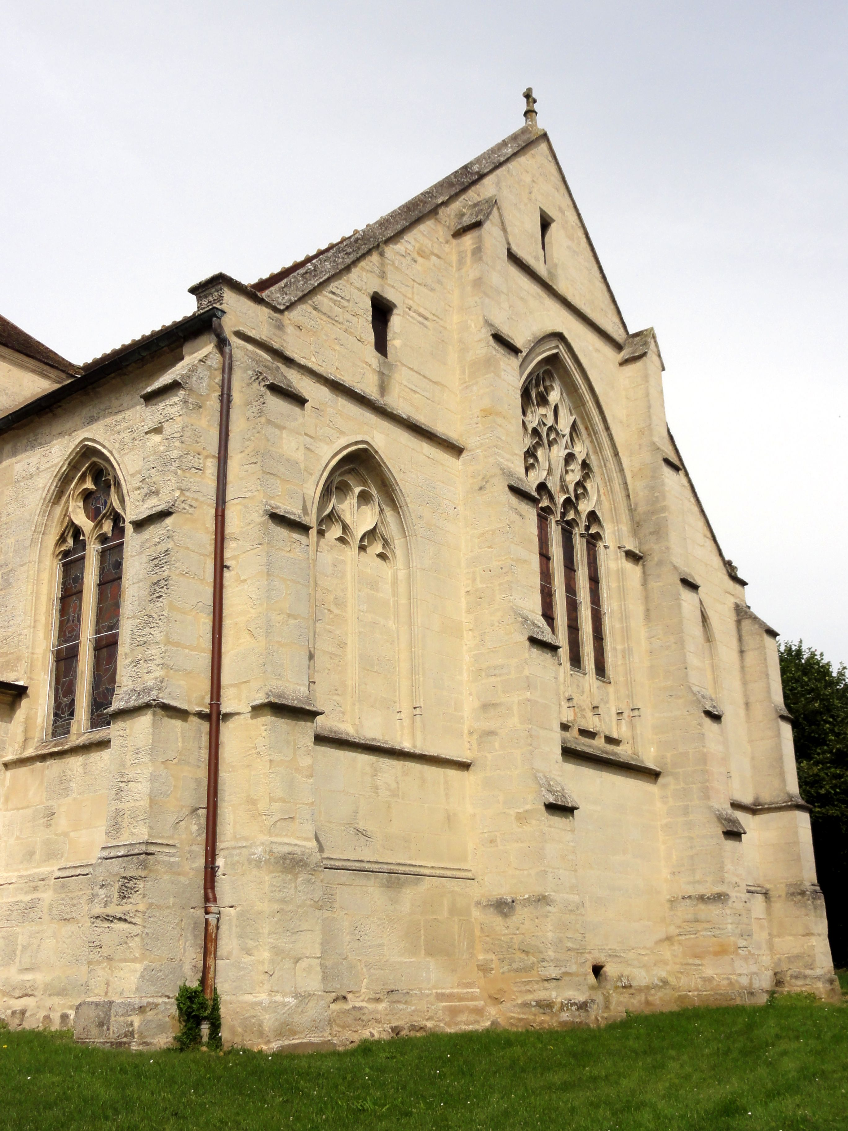 Chevet.